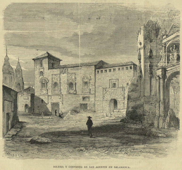 Iglesia y convento de San Agustín en Salamanca, grabado publicado en la revista española La Ilustración Católica.